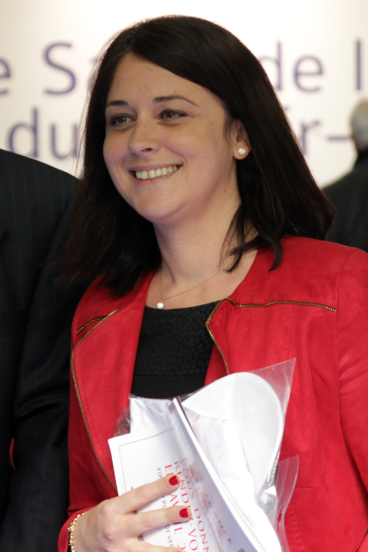 Sylvia Pinel au salon du savoir-faire français le 24 mai 2013 à Paris